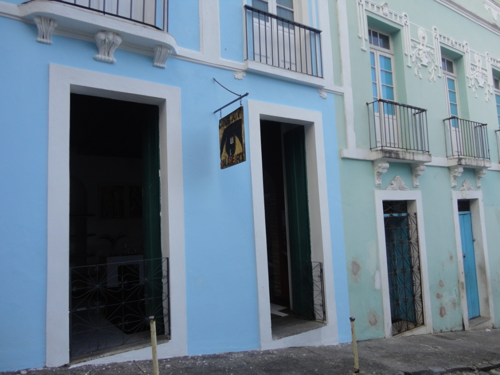 Fachada da SaladeArte Cine XIV